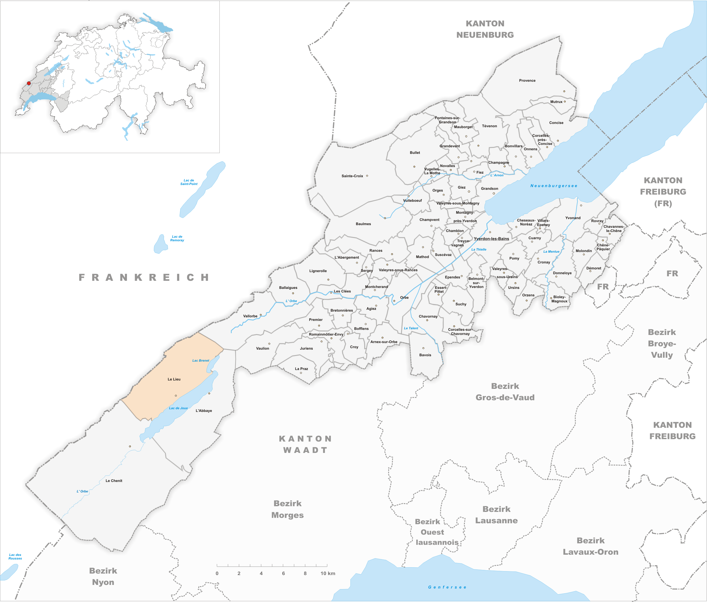 Municipality Le Lieu